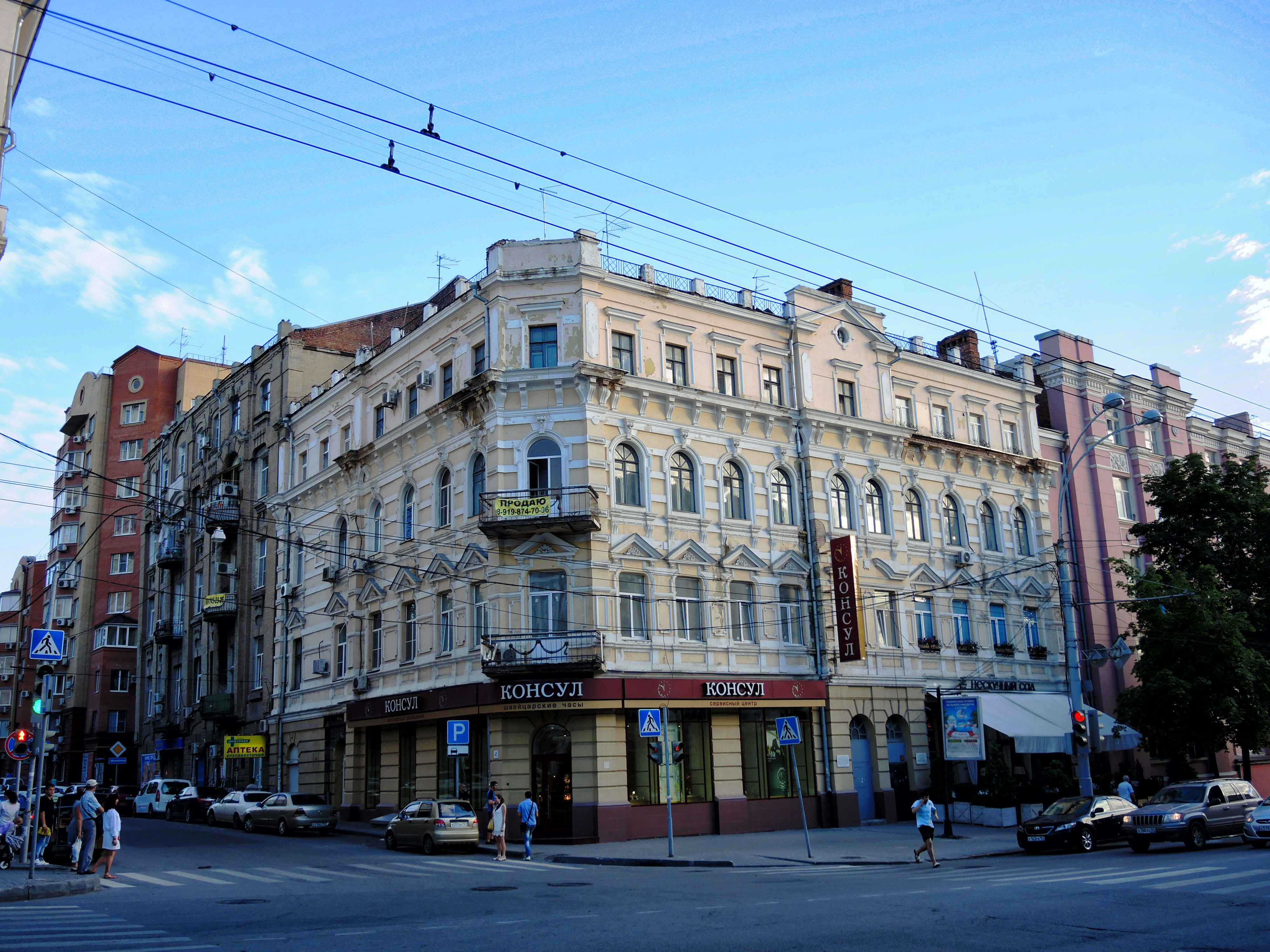 Доходный дом А.А. Леонидова, в котором в 1924-1926 гг. жил писатель А.А. Фадеев: улица Большая Садовая, 30/13/43-45, улица Шаумяна,, Ростов-на-Дону, Ростовская область